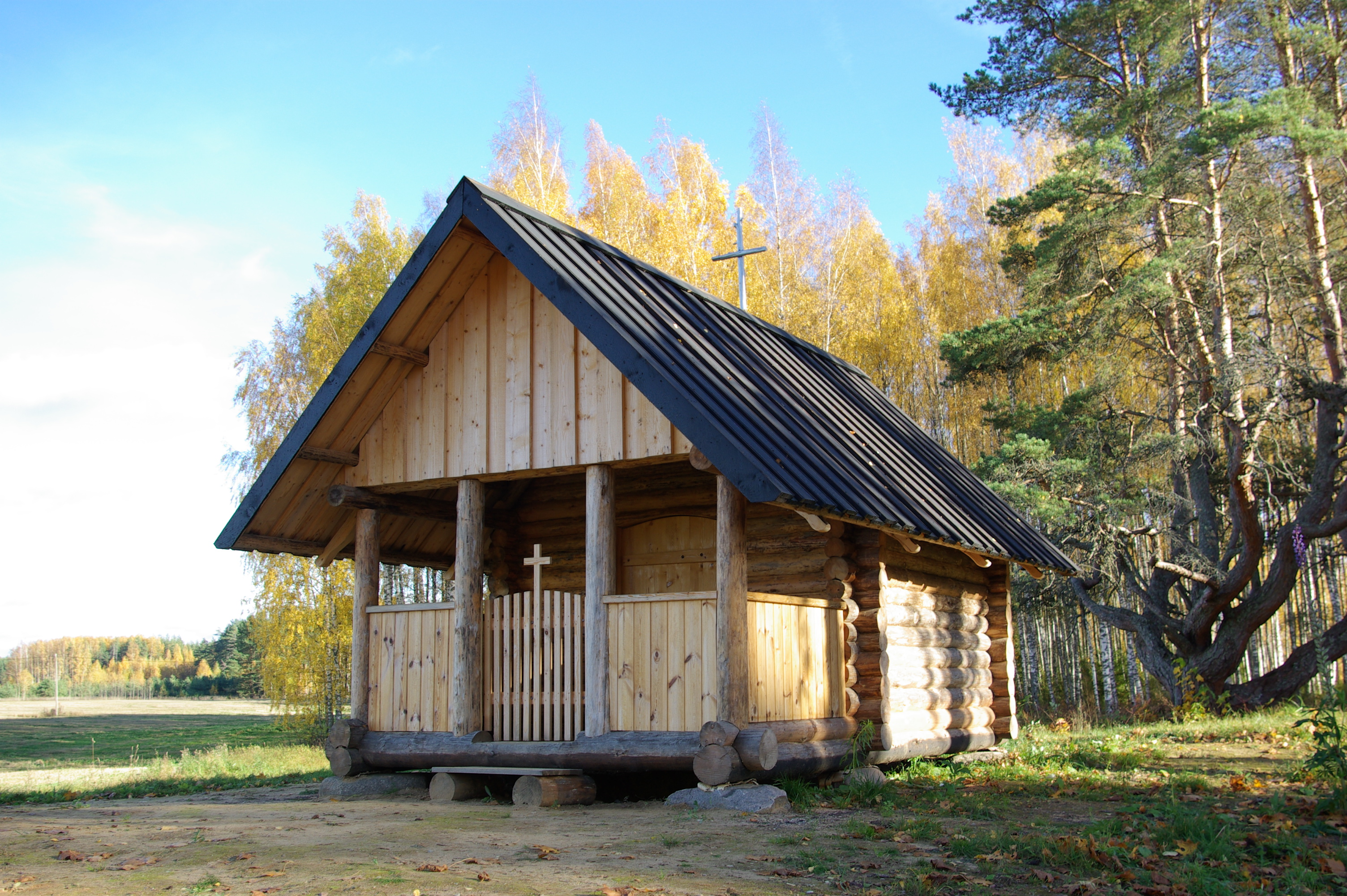 Härmä tsässon